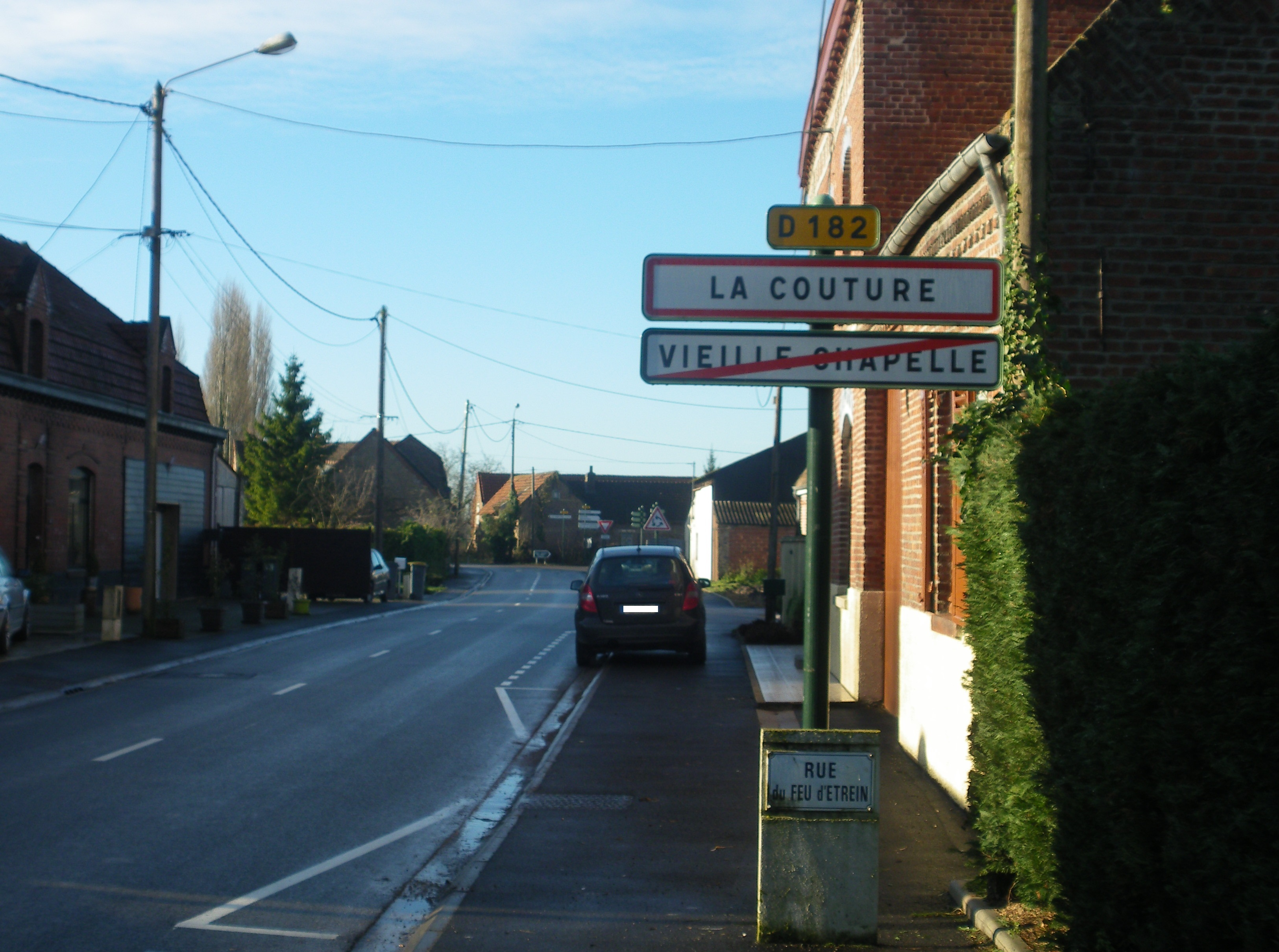 Entrée de La Couture, visible depuis la commune voisine de Vieille-Chapelle.